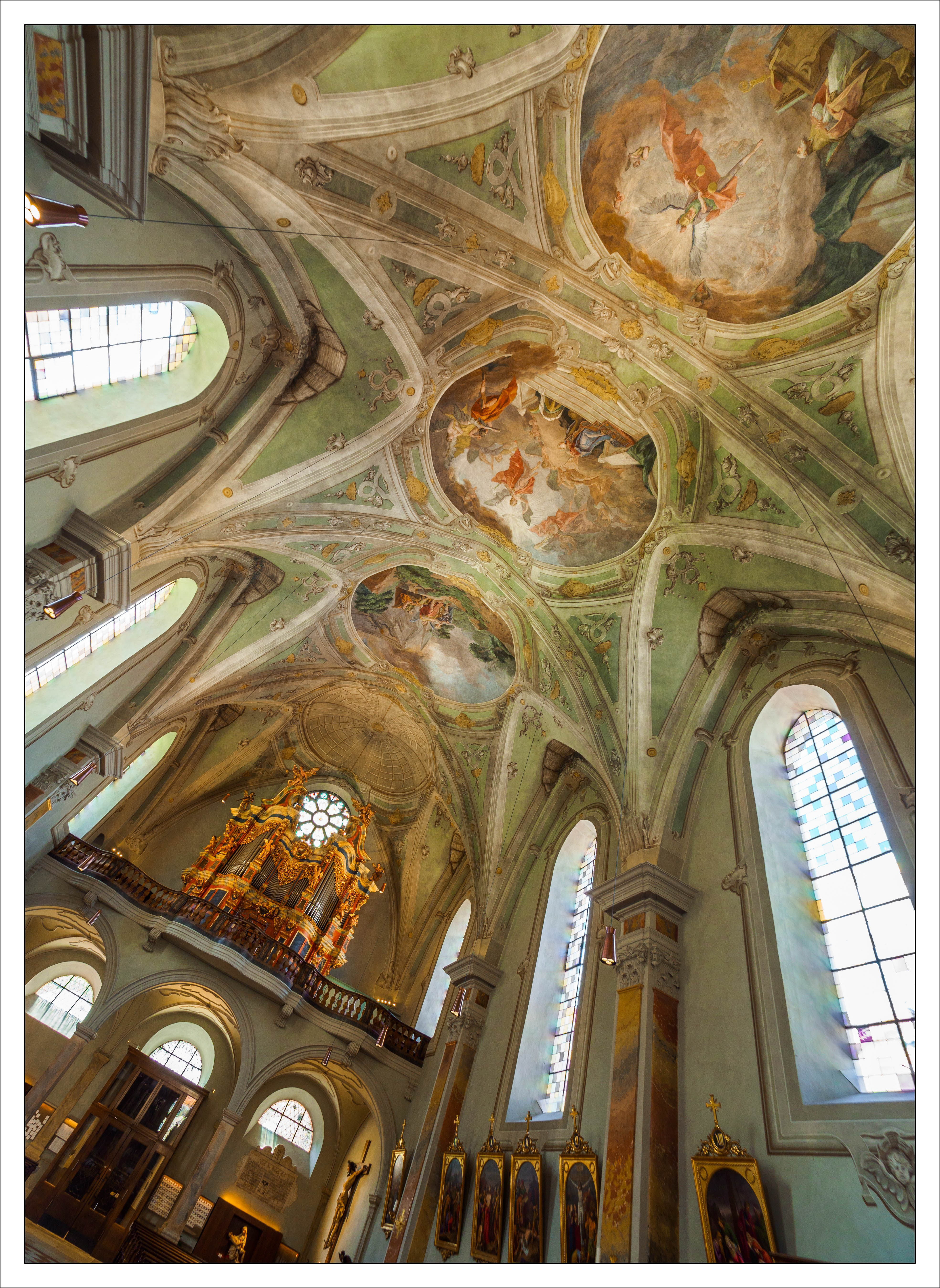 Pfarrkirche St. Michael in Brixen